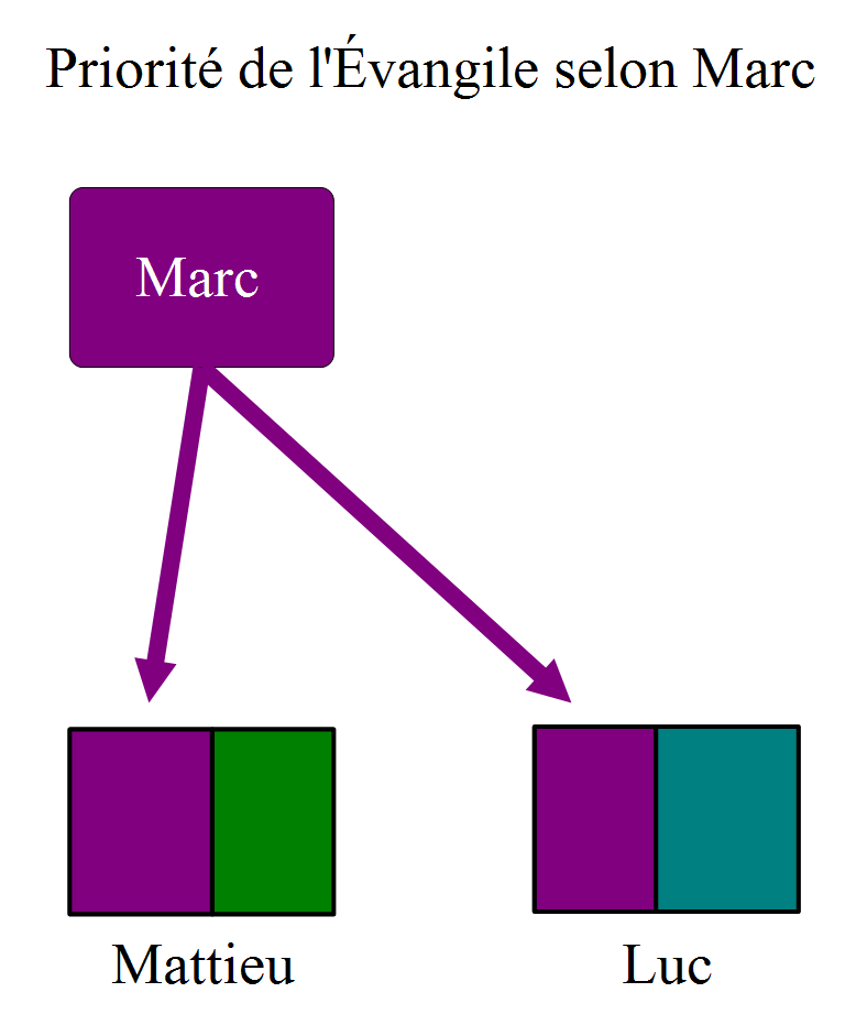 Problème synoptique : hypothèse de la priorité de l'Évangile selon Marc